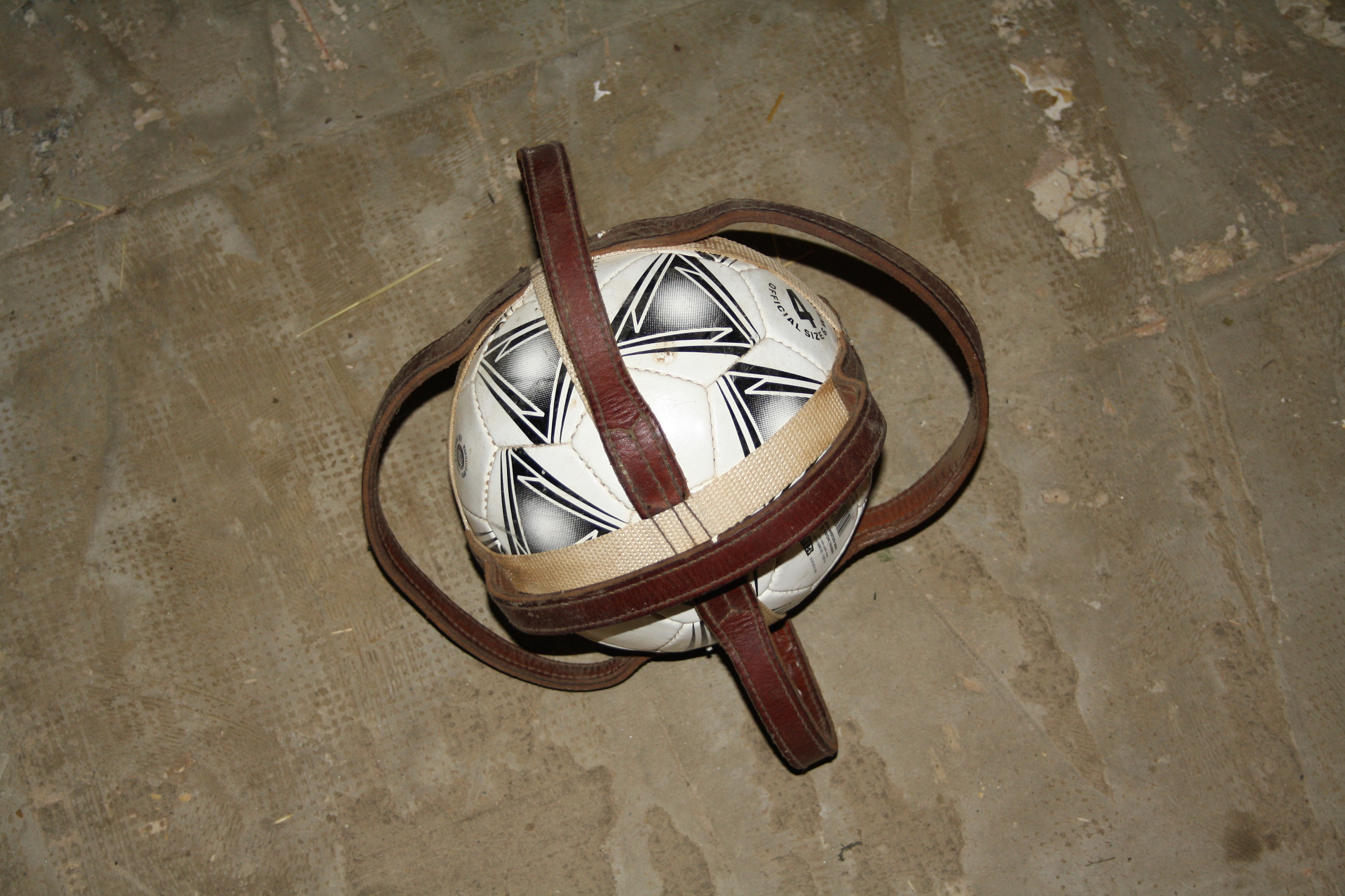 Palla per horseball. Sono visibili le cinghie, utili per il "ramassage" (raccolta a terra della palla).